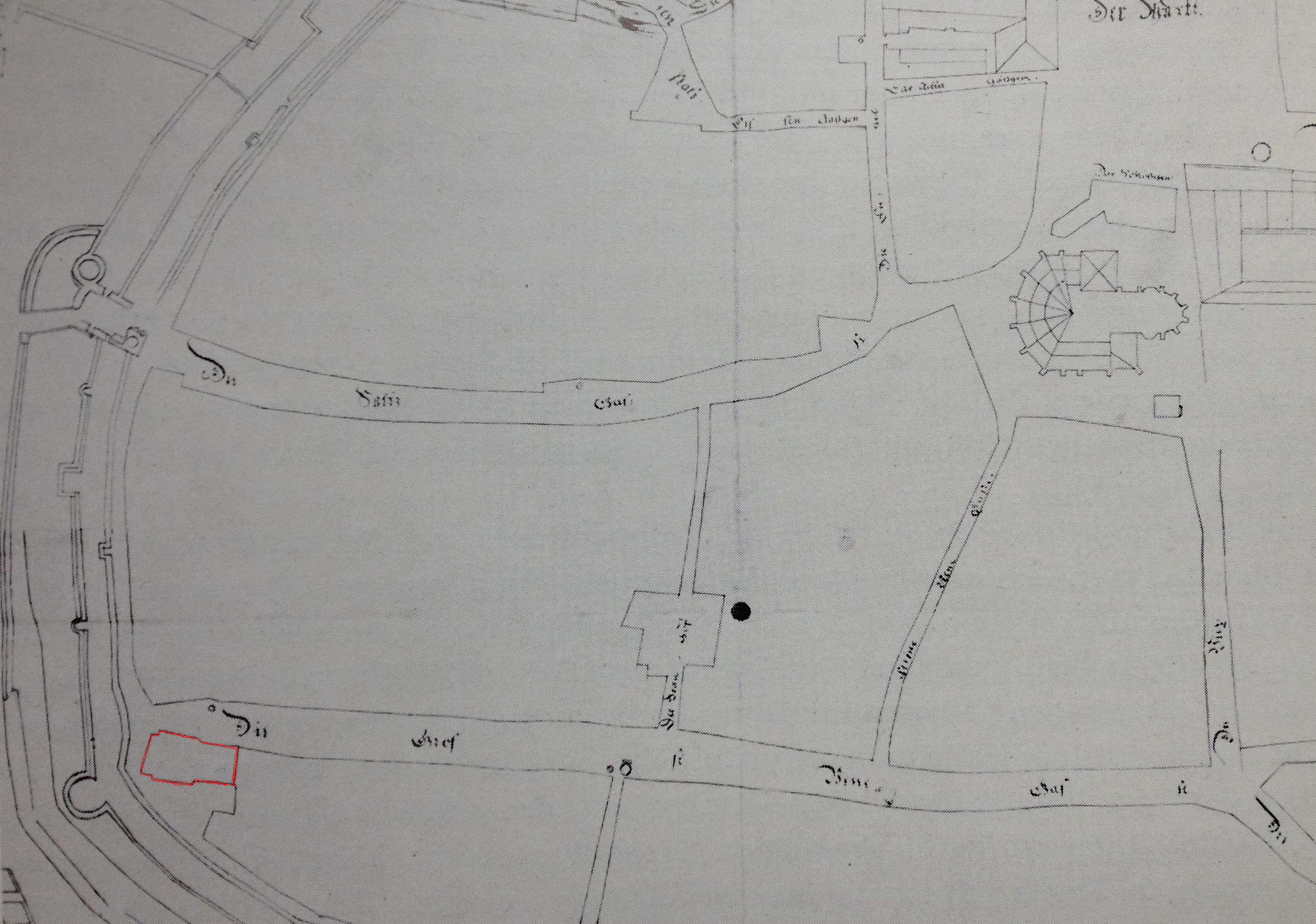 Kartenausschnitt Stadtplan Naumburg mit roten Umrissen der Oper